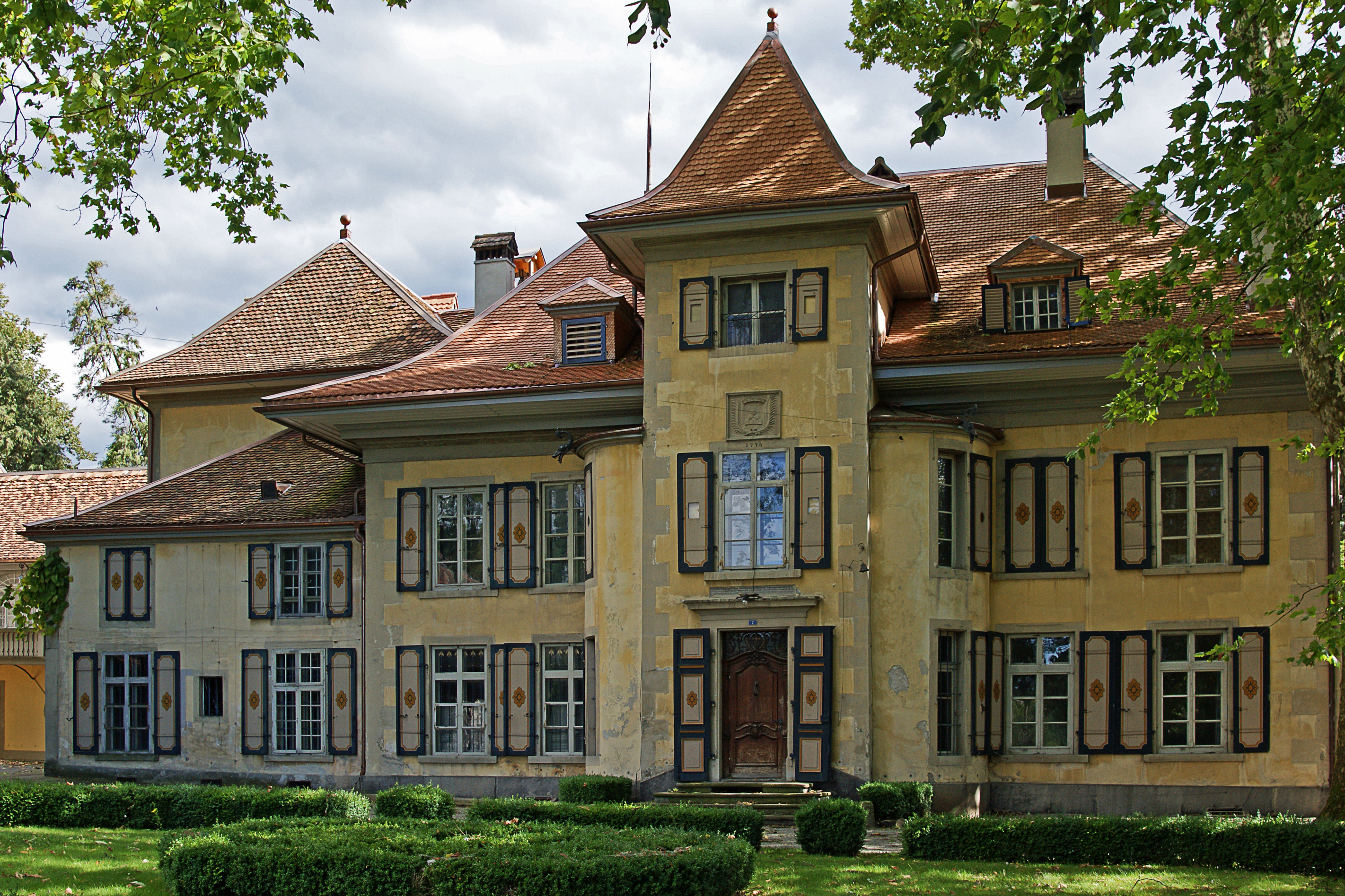 Schloss Kiesen (in unrenoviertem Zustand)